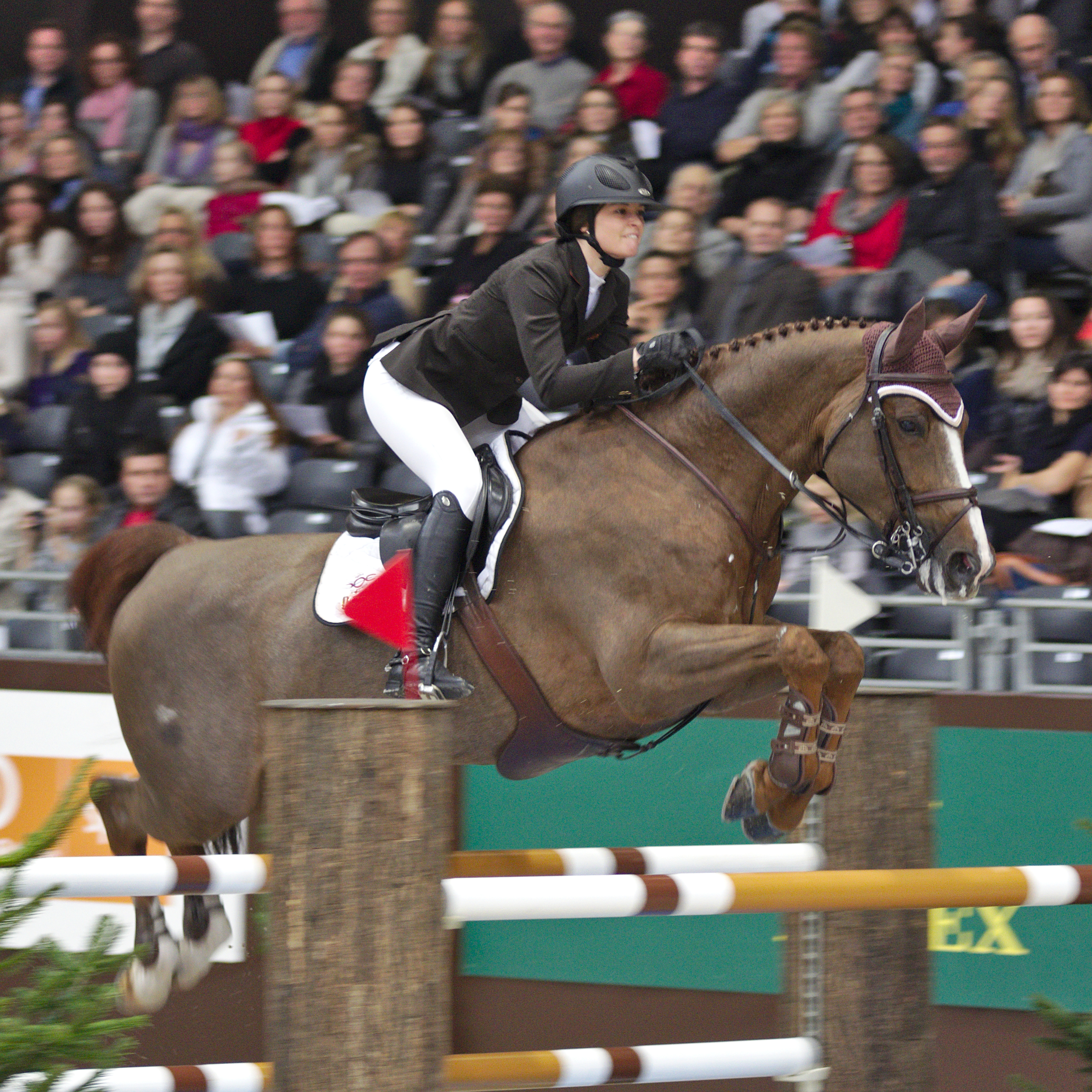 CHI Genève 2013 - 20131213 - Reed Kessler et Cylana